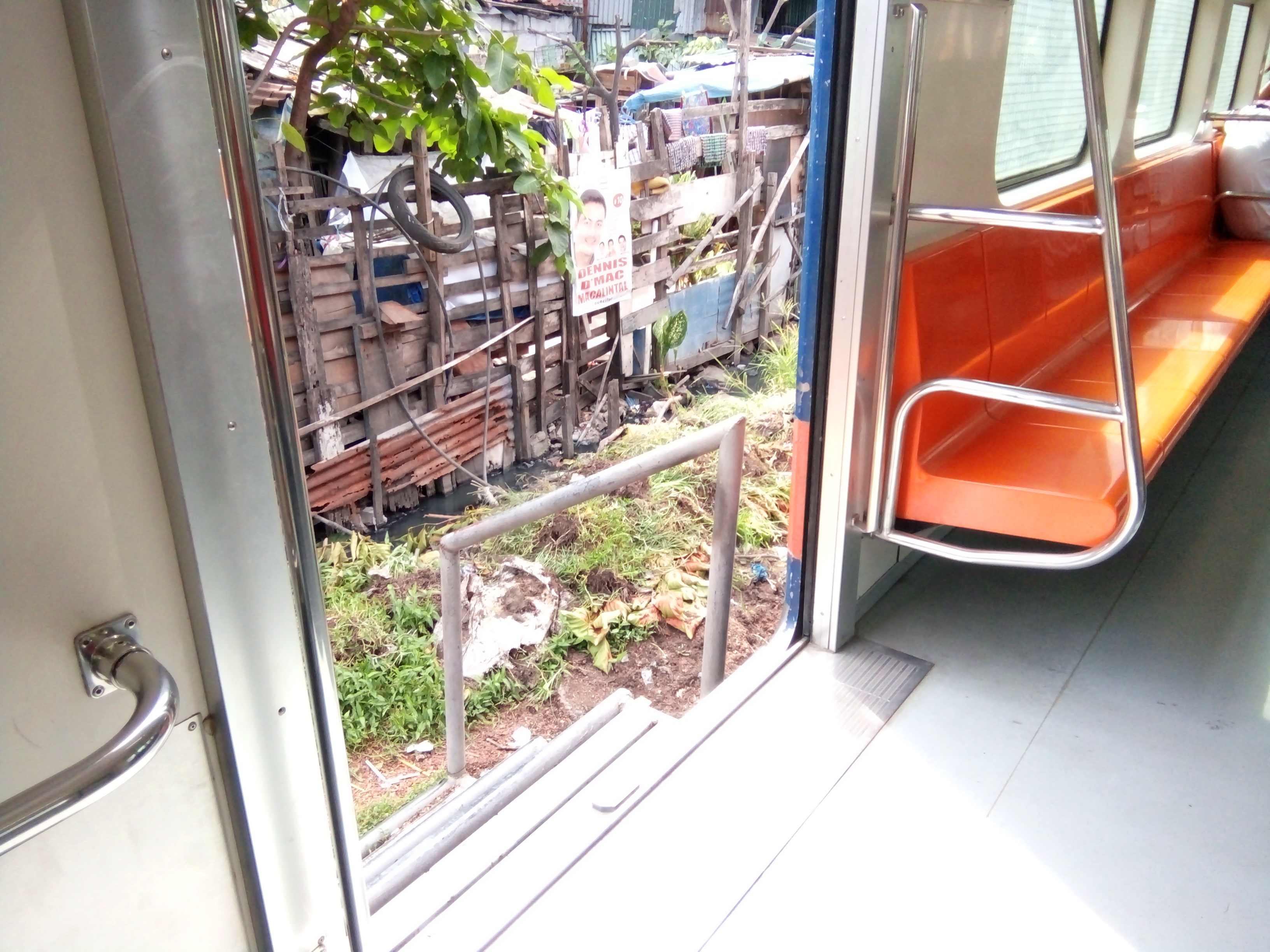 Tagalog: Bakal na hagdan ng PNR C-3 station.